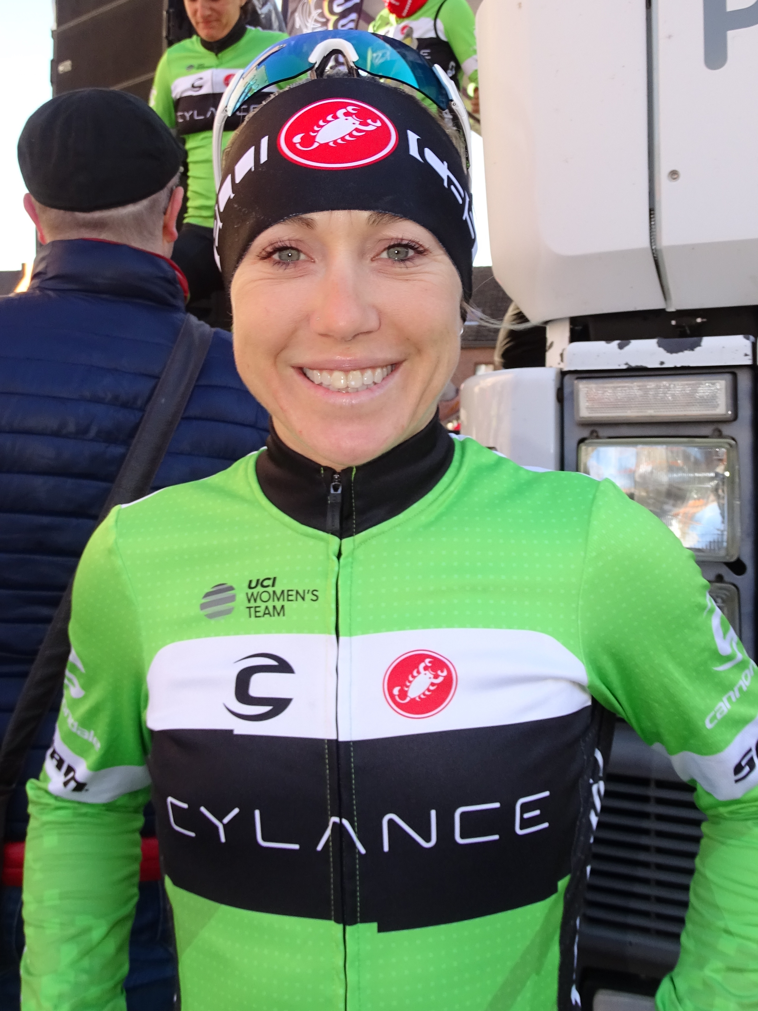 Reportage réalisé le mercredi 2 mars à l'occasion du départ du Samyn des Dames 2016 et du Samyn 2016 à Quaregnon, Belgique.